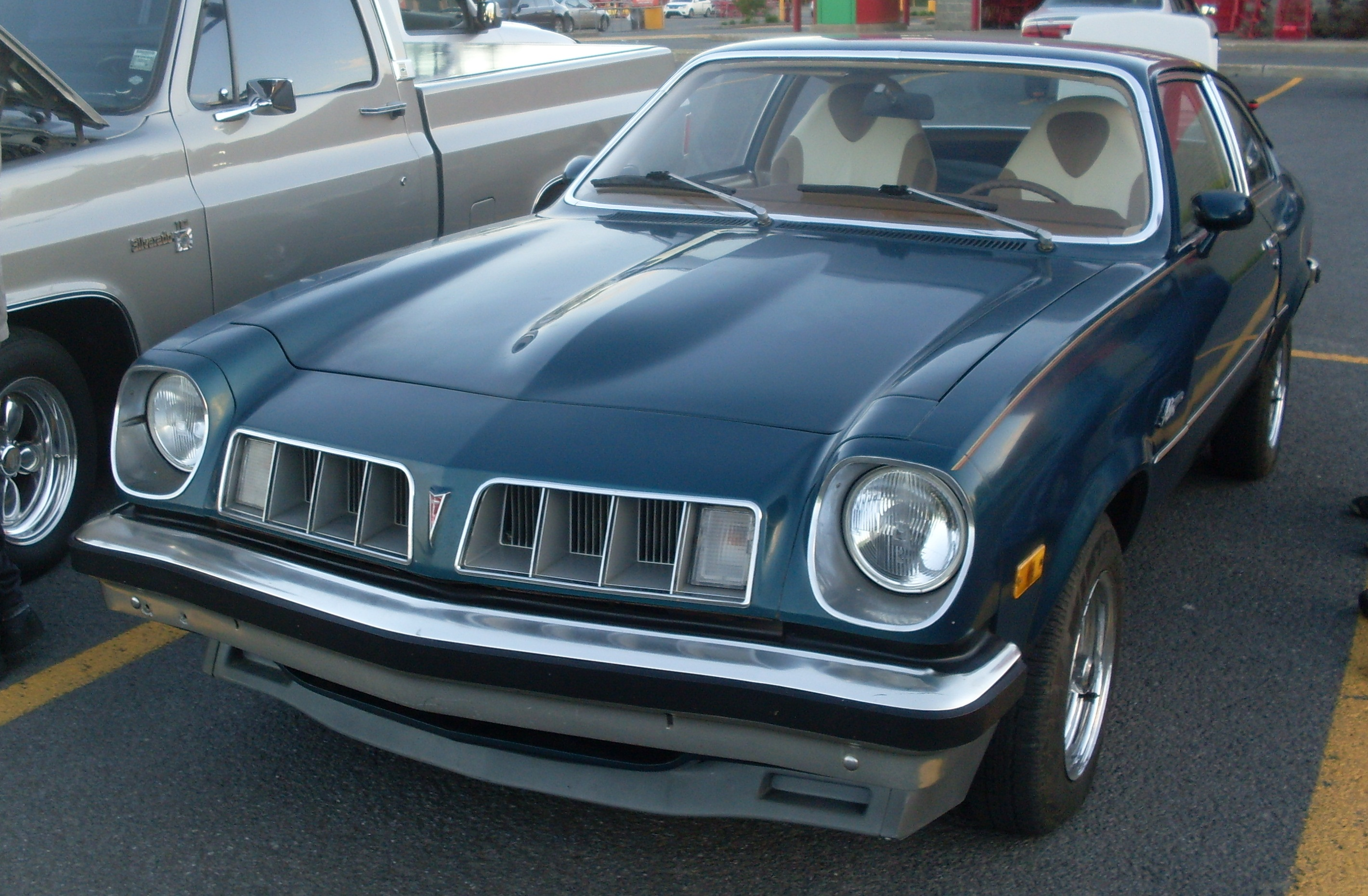 Pontiac AStre photographed in St. Constant, Quebec, Canada at Auto classique St-Constant 2013.